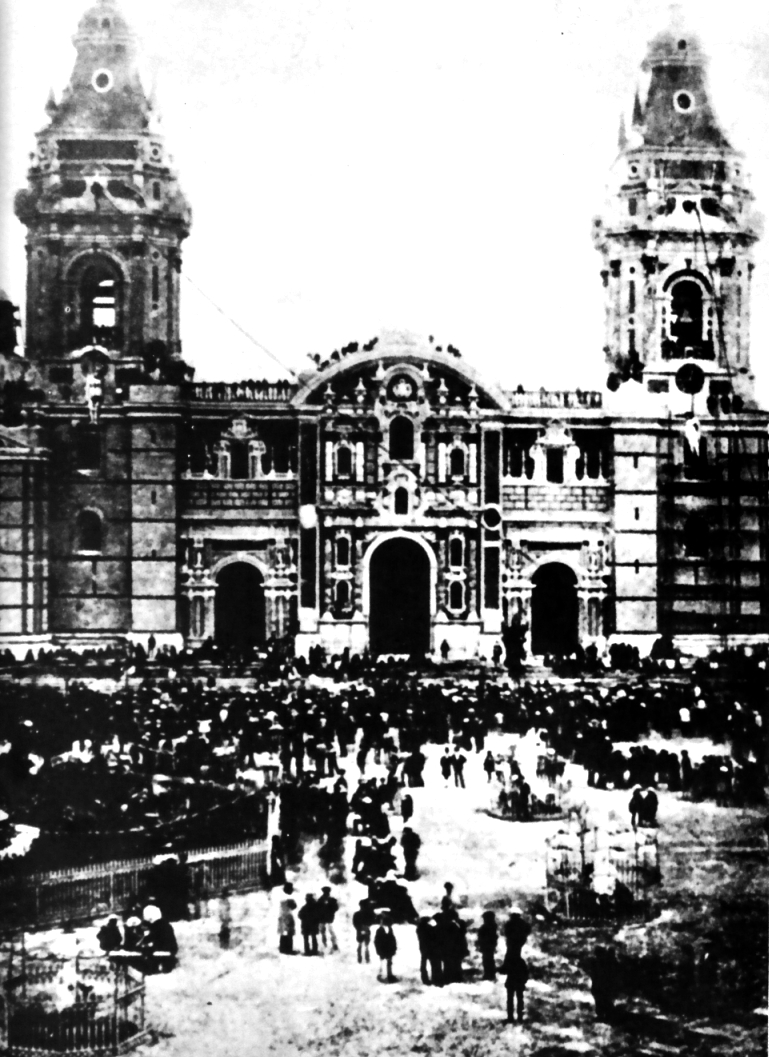 Los cadáveres de Tomás y Silvestre Gutiérrez, coroneles golpistas del Perú, aparecen colgados en las torres de la Catedral de Lima. 27 de julio de 1872.